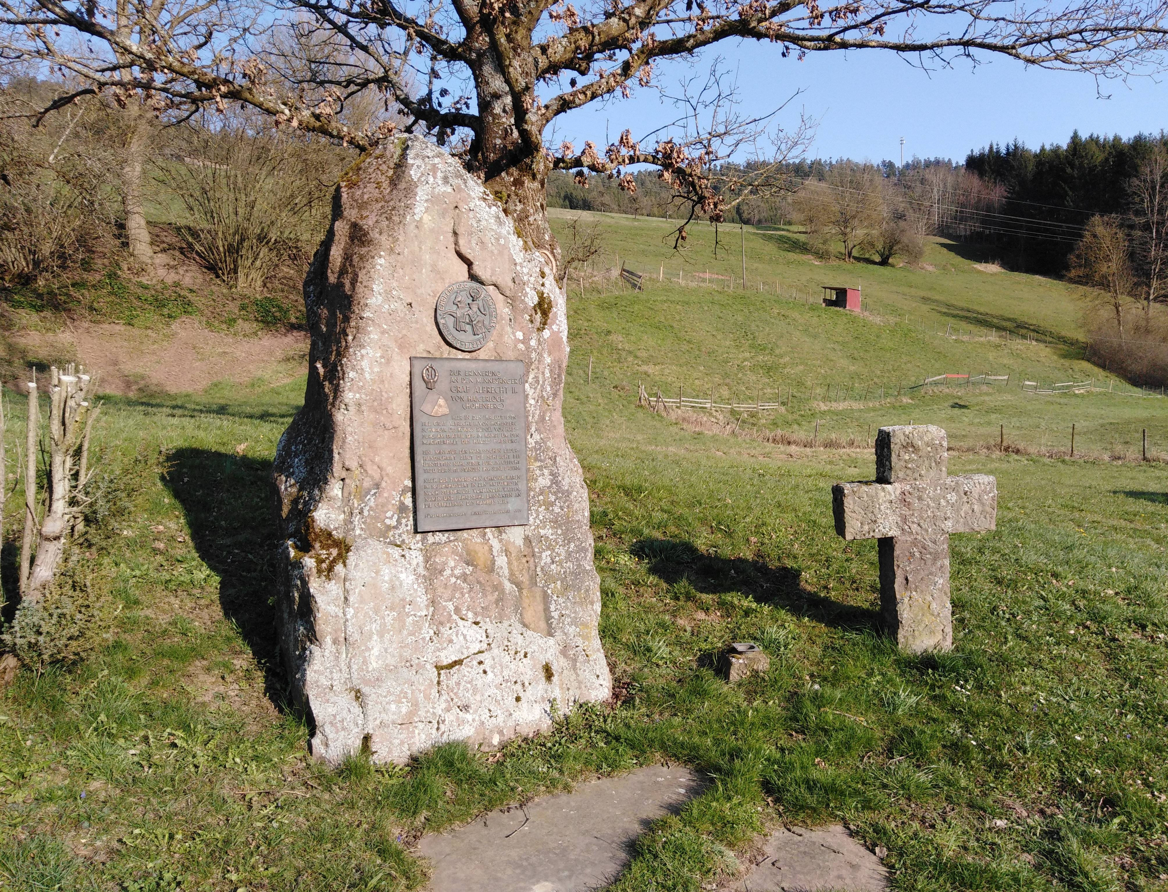 Minnesängerdenkmal für Albrecht II von Hohenberg (Haigerloch)